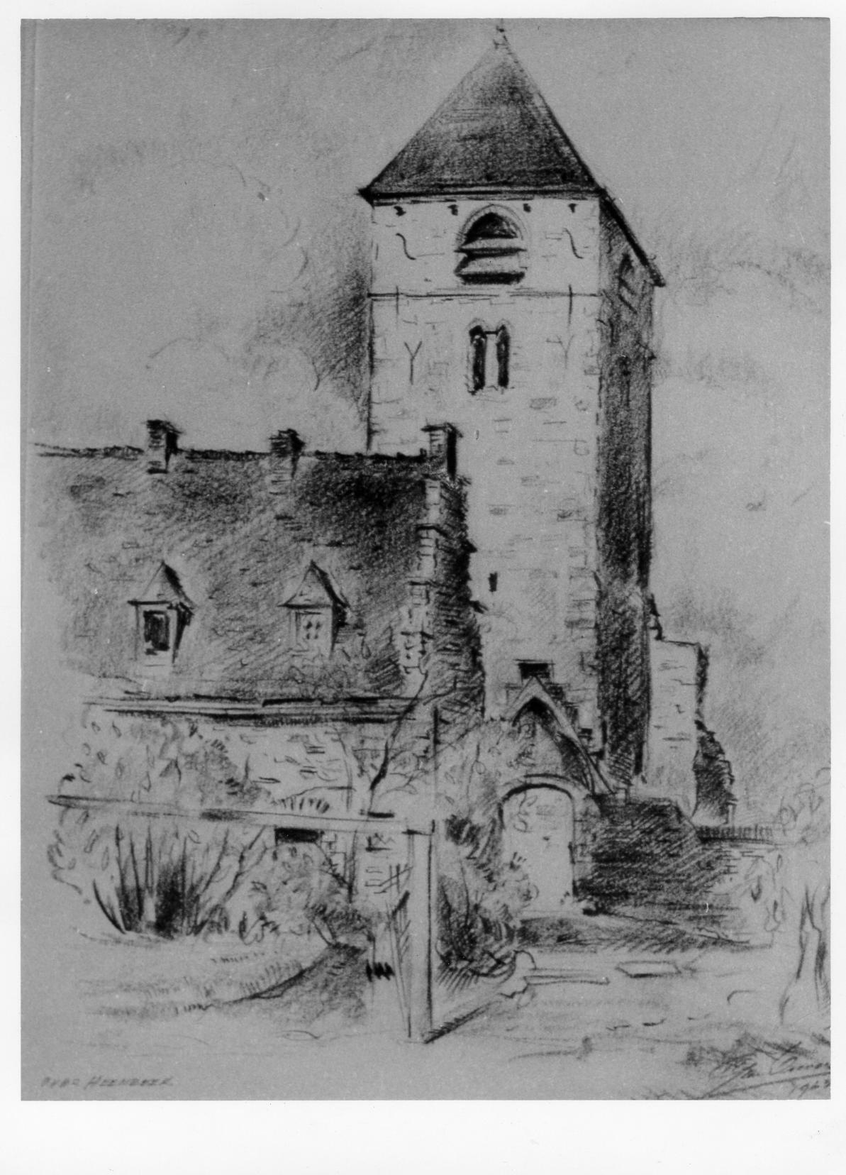 La vieille tour romane à Neder-over-Heembeek, dessin de 1963, par Léon van Dievoet, architecte à Bruxelles.